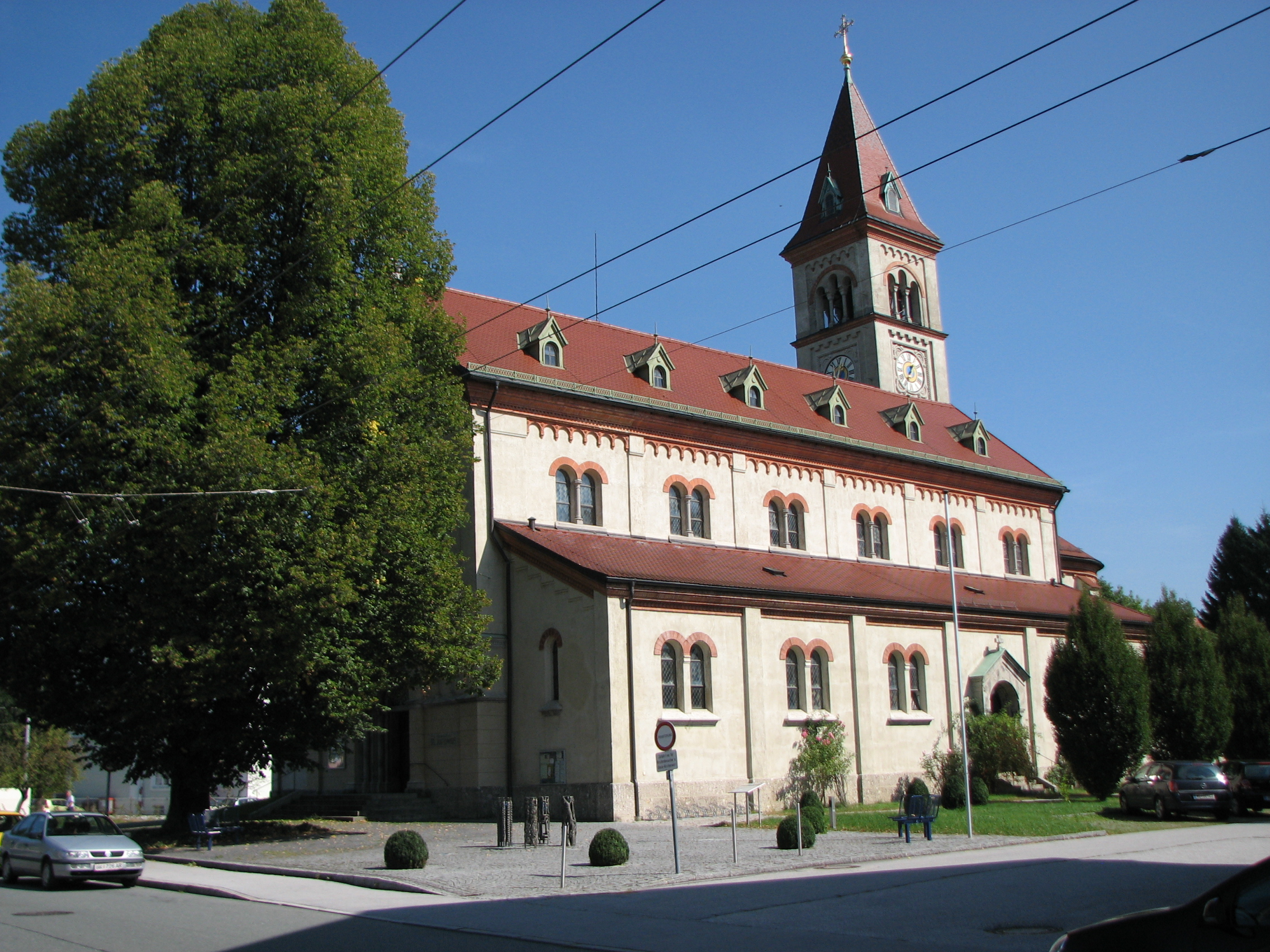 Kath. Pfarrkirche Itzling, hl. Antonius von Padua von Itzlinger Hauptstrasse aus gesehen